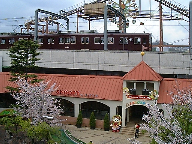 宝塚ファミリーランド 園内を通る阪急今津線